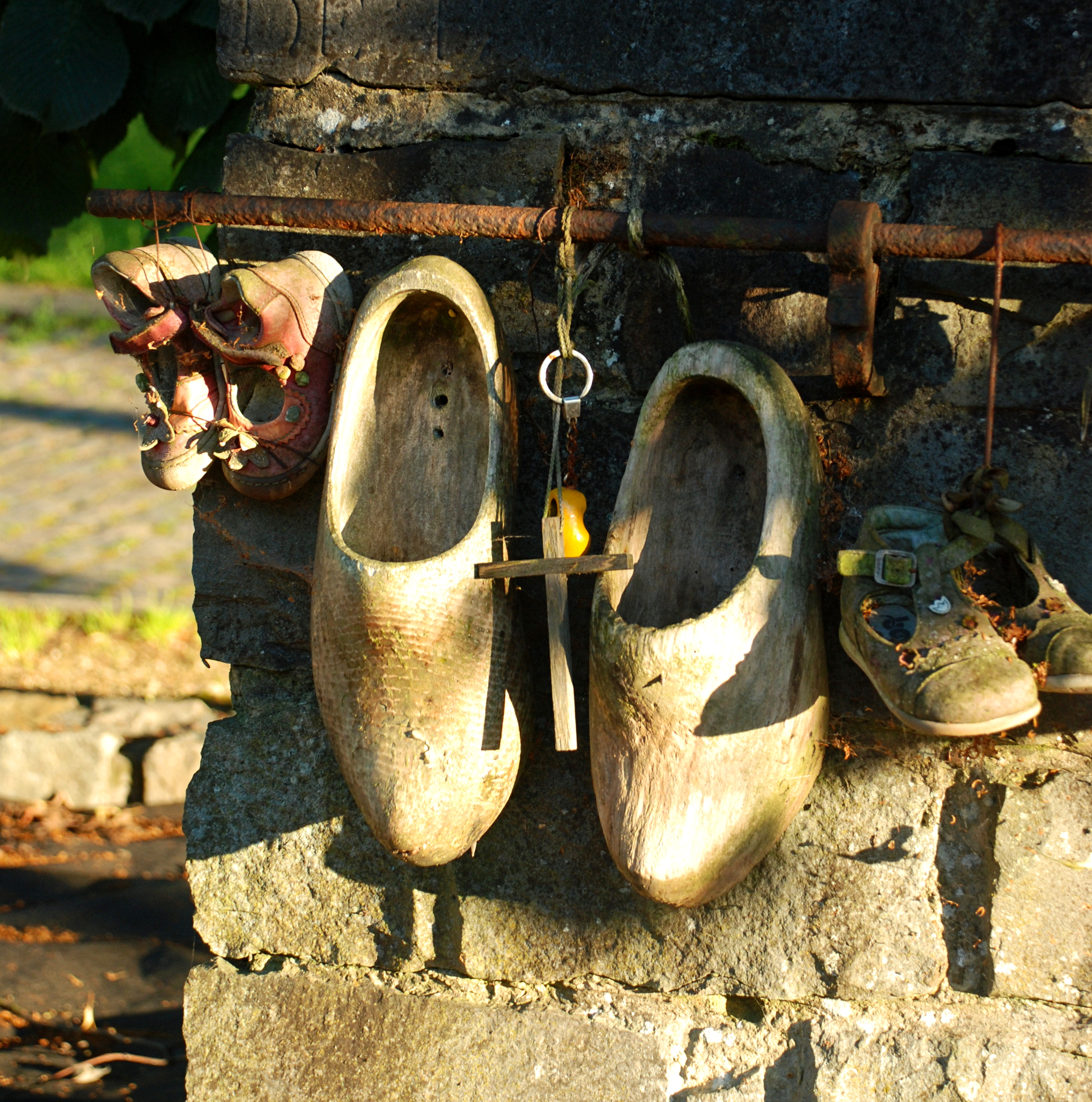 Belgique - Brabant wallon - Court-Saint-Étienne - Chapelle aux Sabots